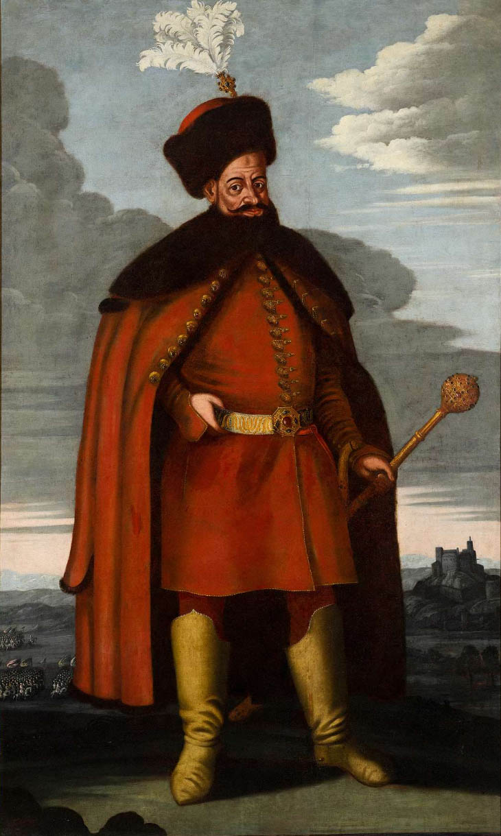 Porträt von Graf Ádám Batthyány (1609-1659). Ősgalériák, Adelsfamilienportäts der ungarischen historischen Bildergalerie, herausgegeben von Buzási Eniko. Budapest, 1988. Foto: Levente Szucs Szepsy. Ungarisches Nationalmuseum, Budapest